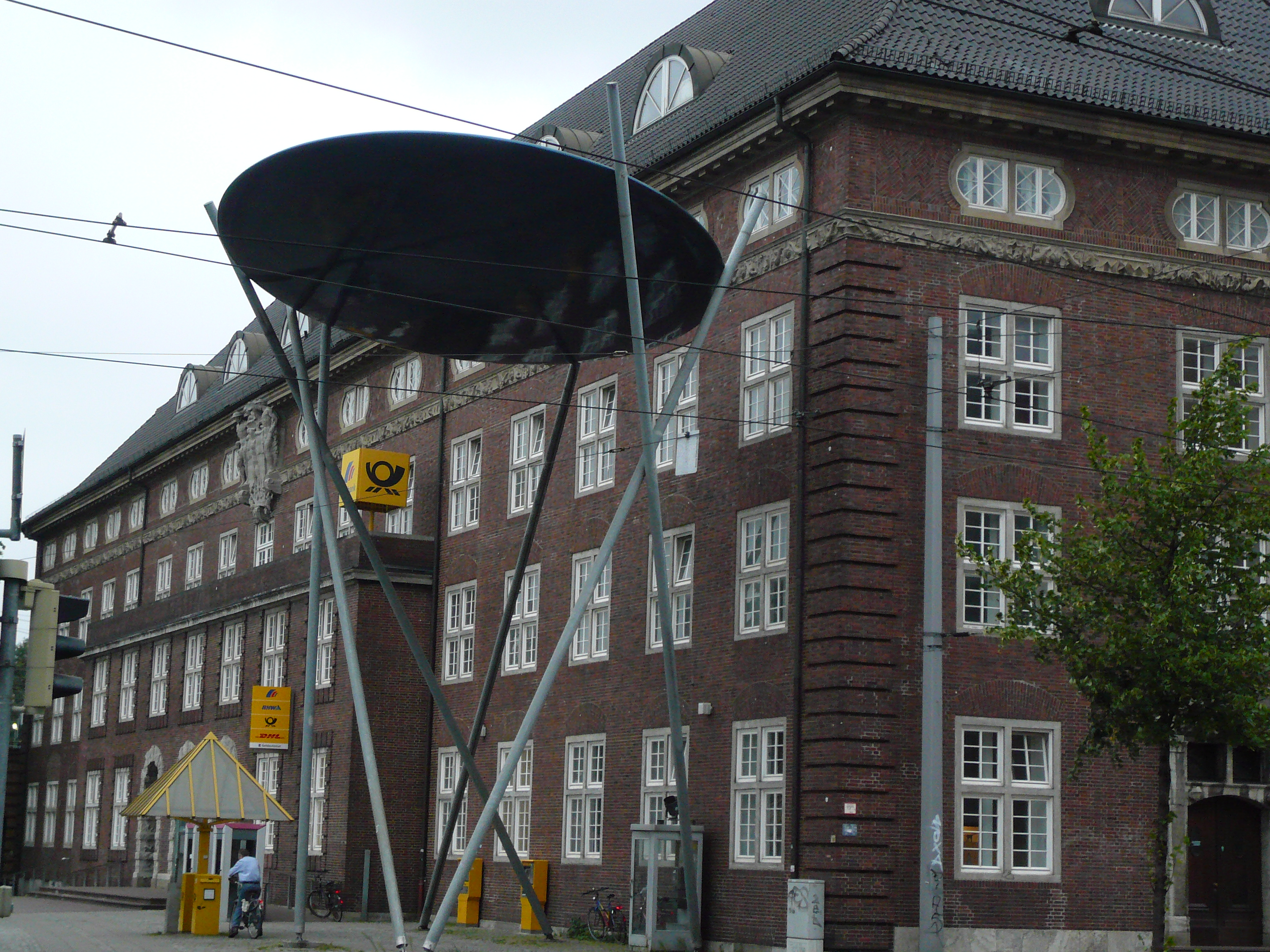 Das alte Hauptpostamt 5 in Bremen